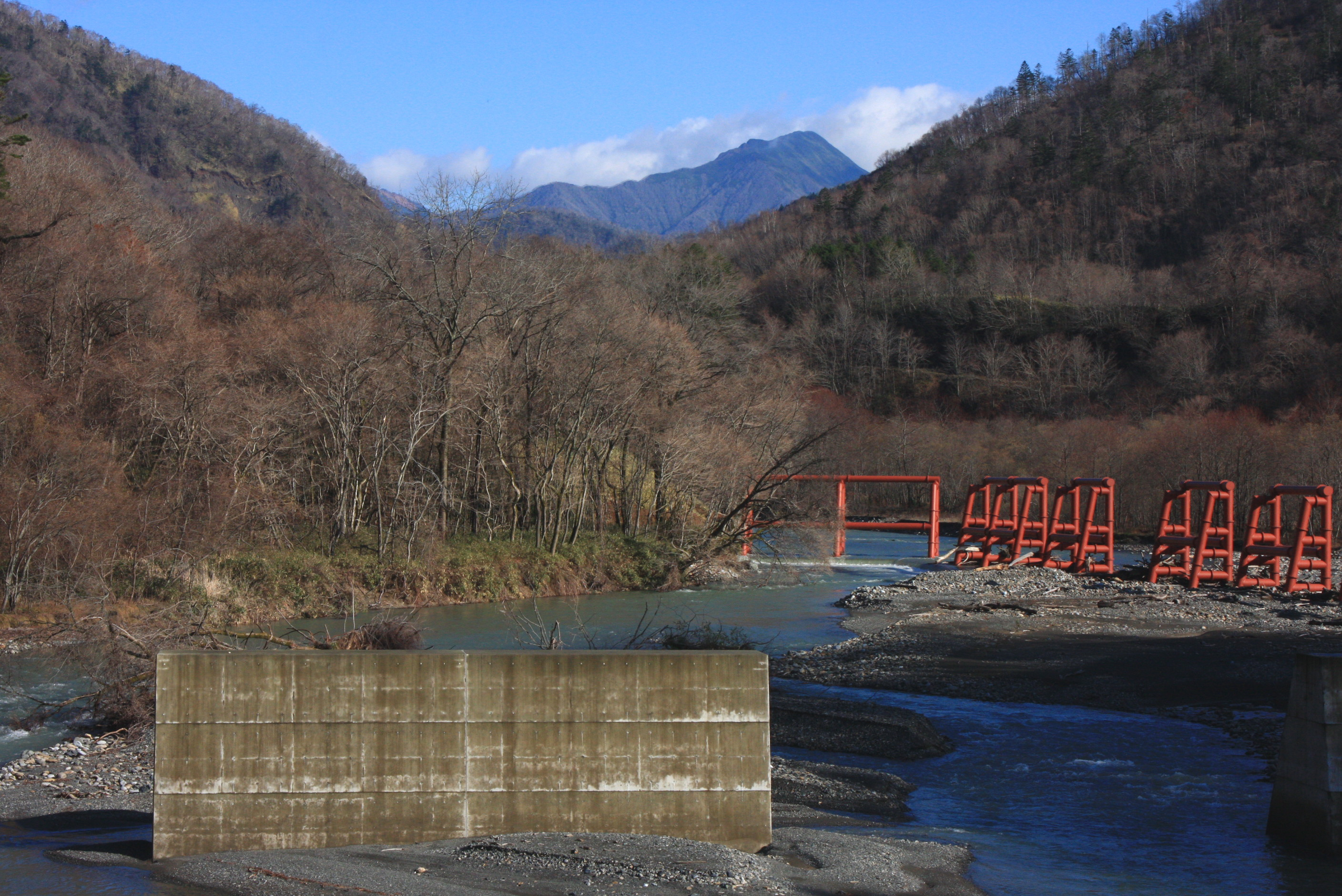 神威橋より望む元浦川